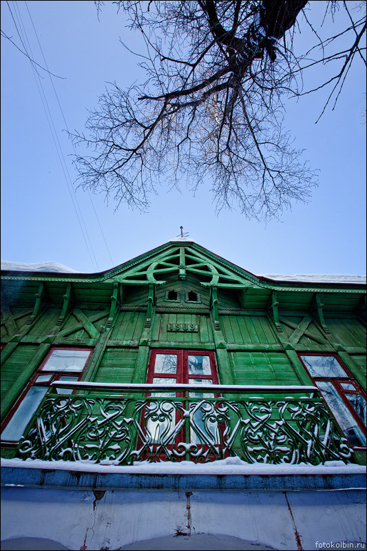 Хабаровск, ул. Ким Ю Чена, 9